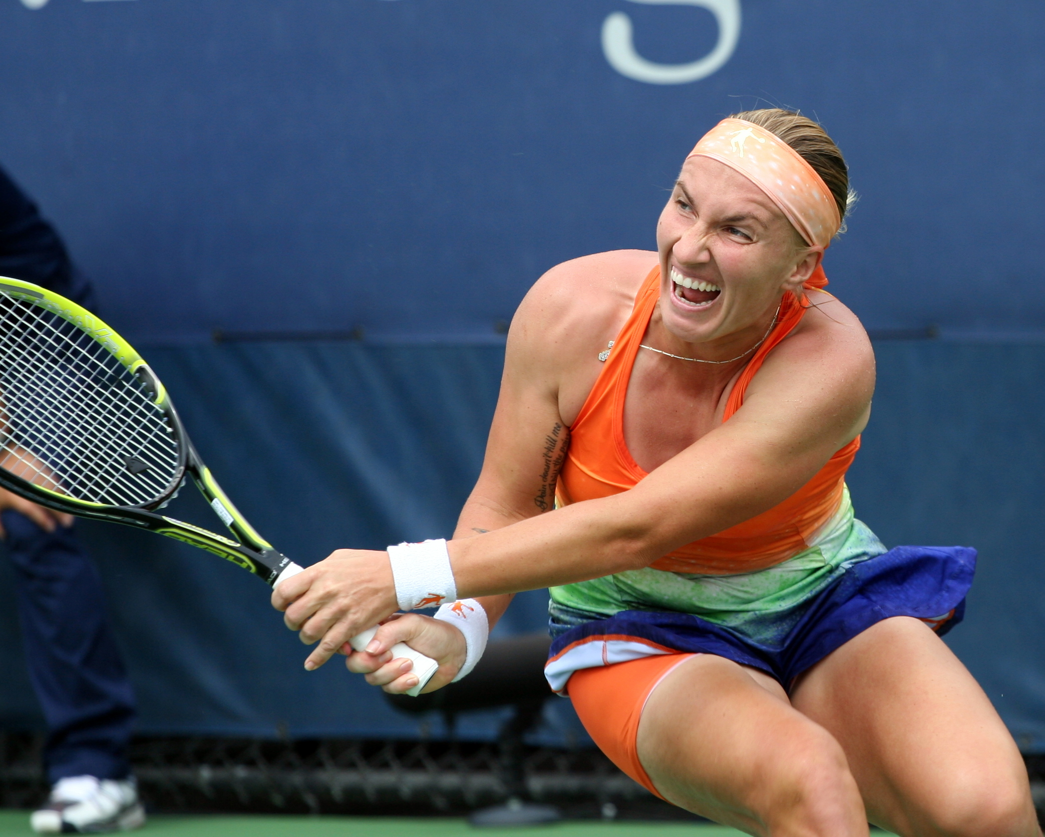 Svetlana Kuznetsova - Saturday, August 31, 2013